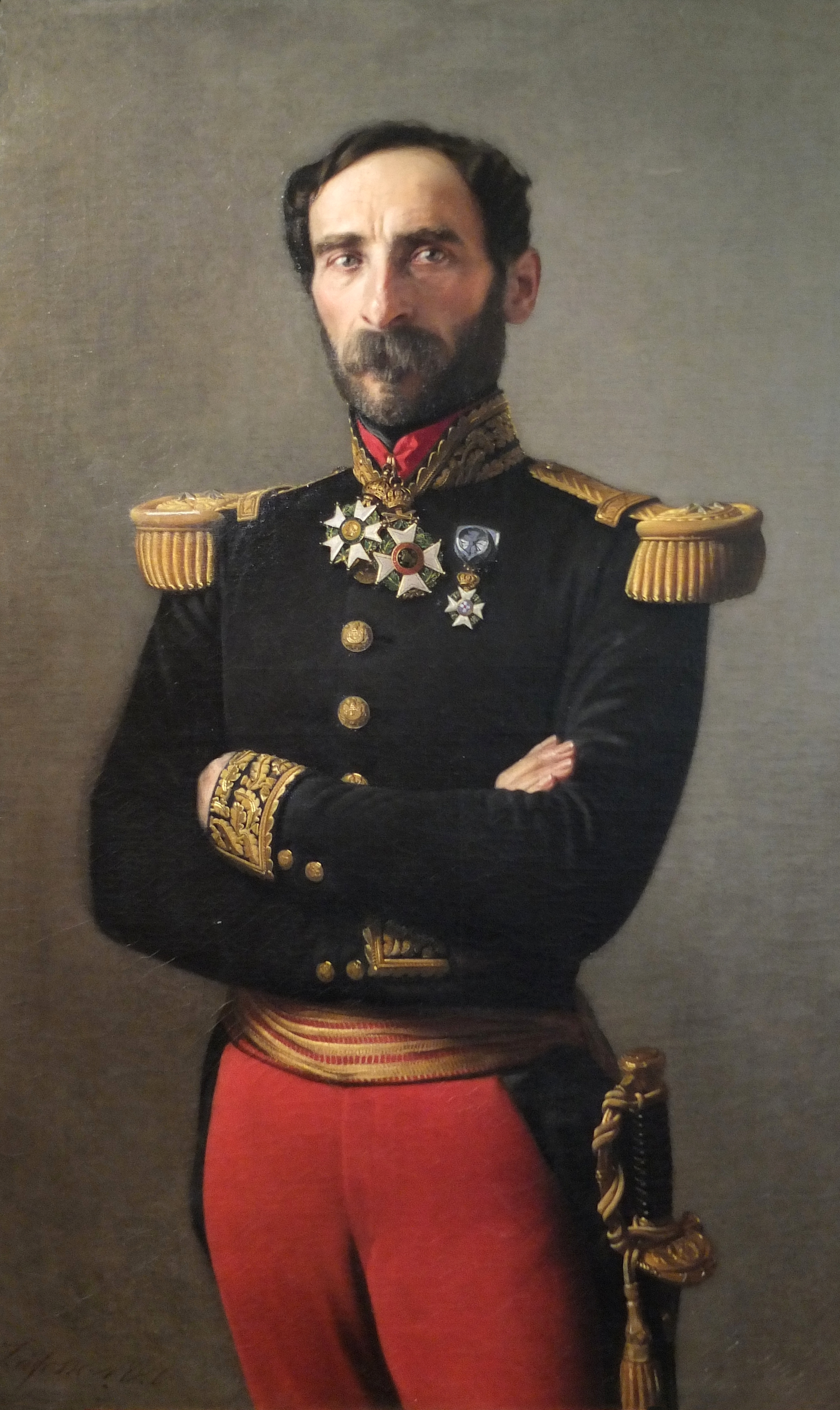 Louis-Eugène Cavaignac (1802-1857), huile sur toile par Jean-Baptiste Delafosse